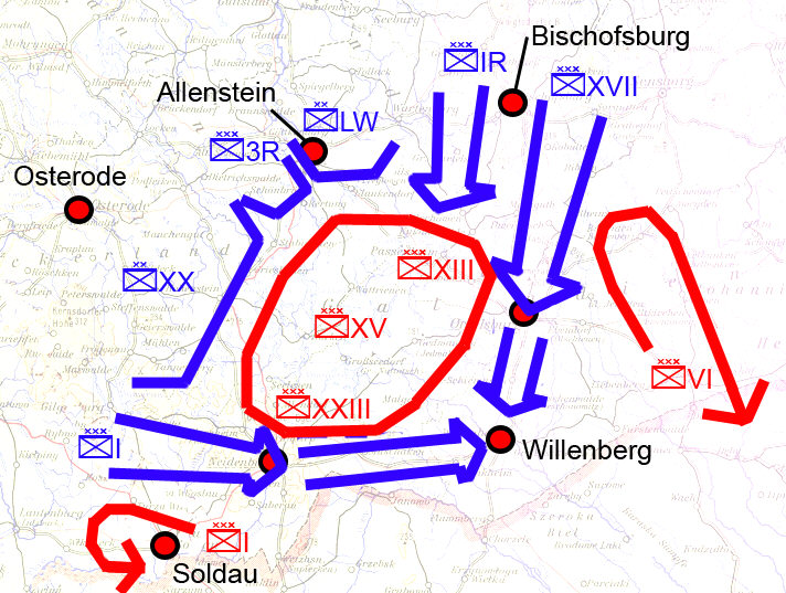 Slaget ved Tannenberg, situationen den 28. august 1914.